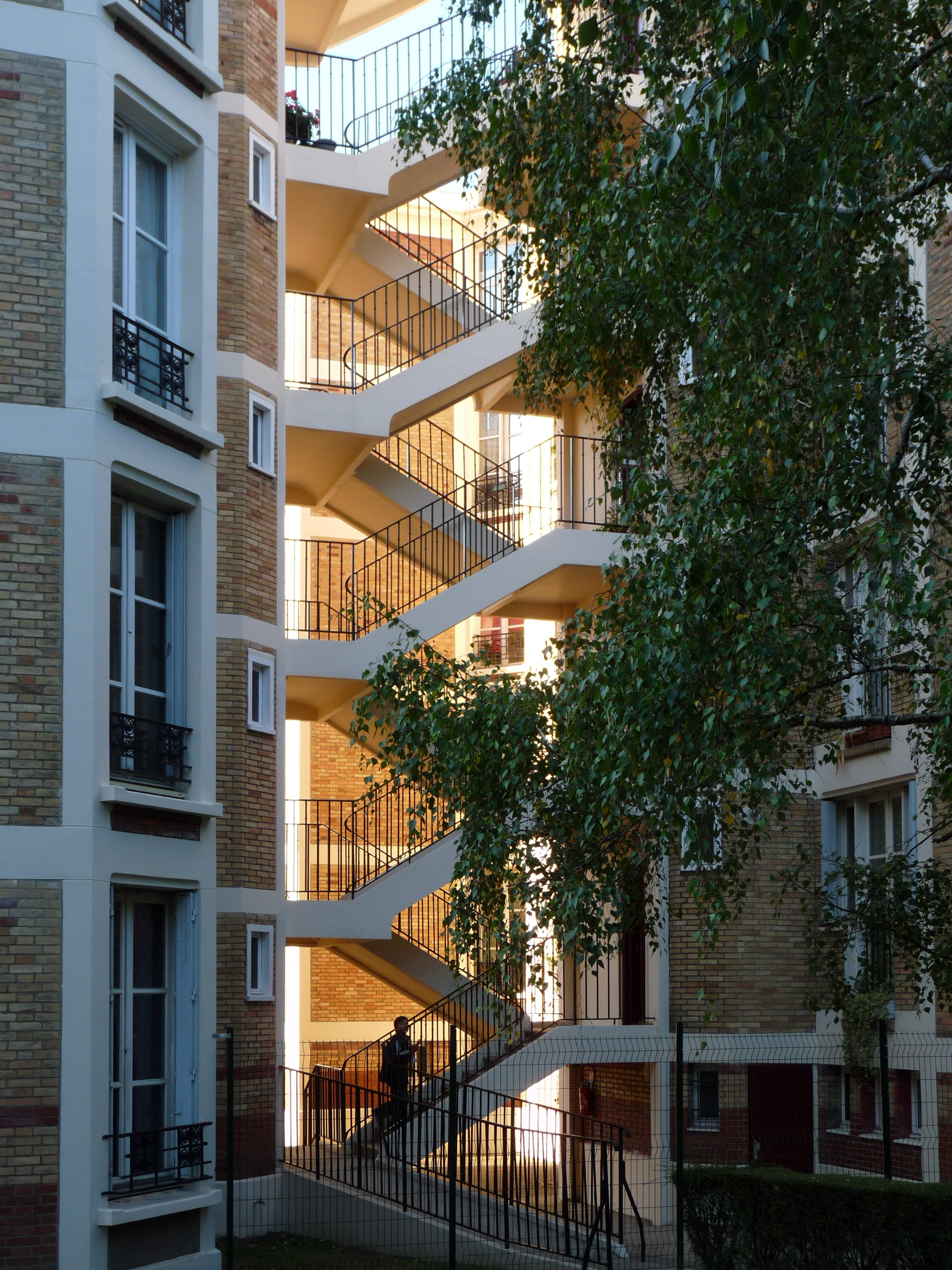 Détail des HLM de la rue de la Saïda à Paris